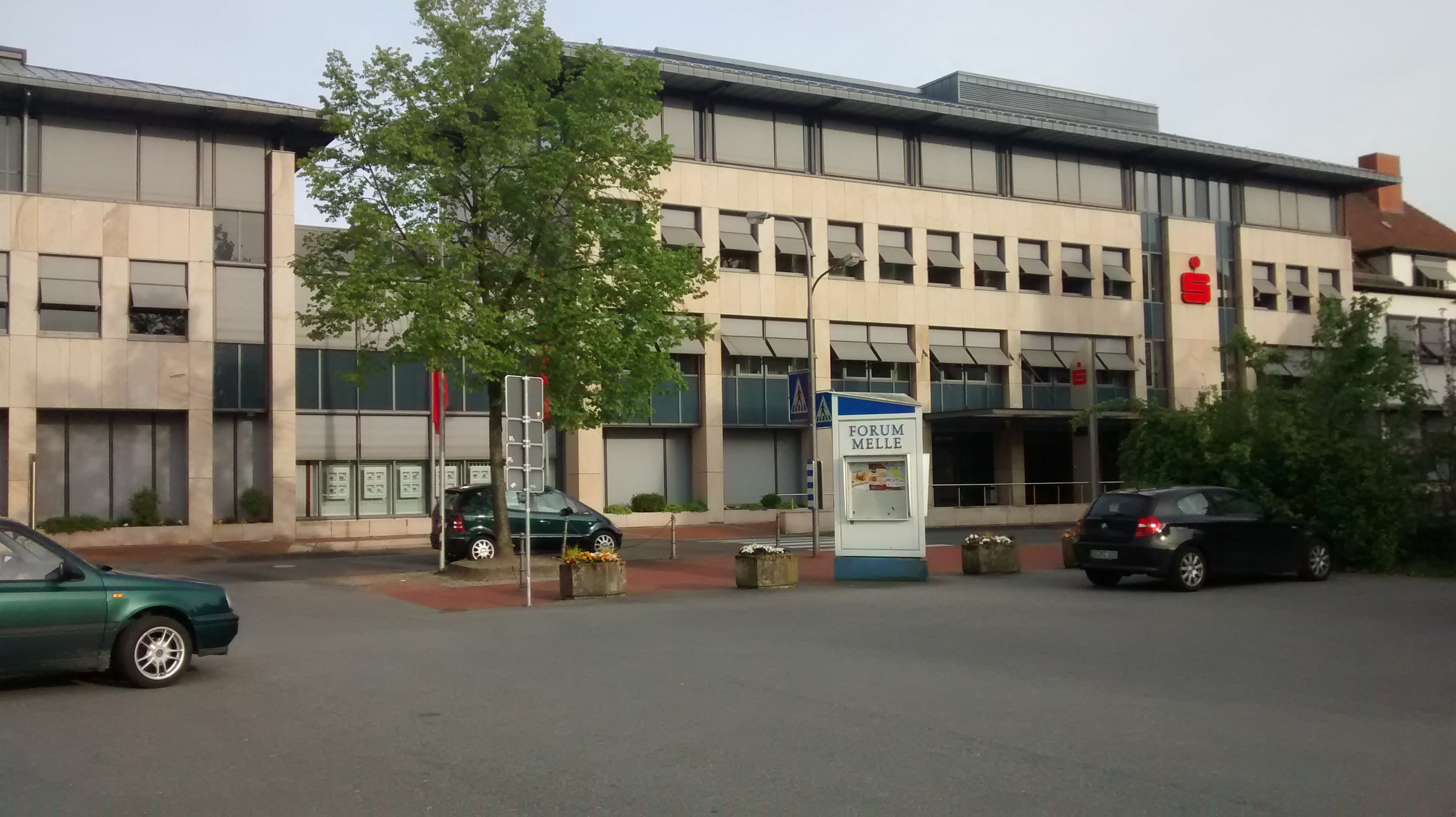 Das Sparkassengebäude in Melle.